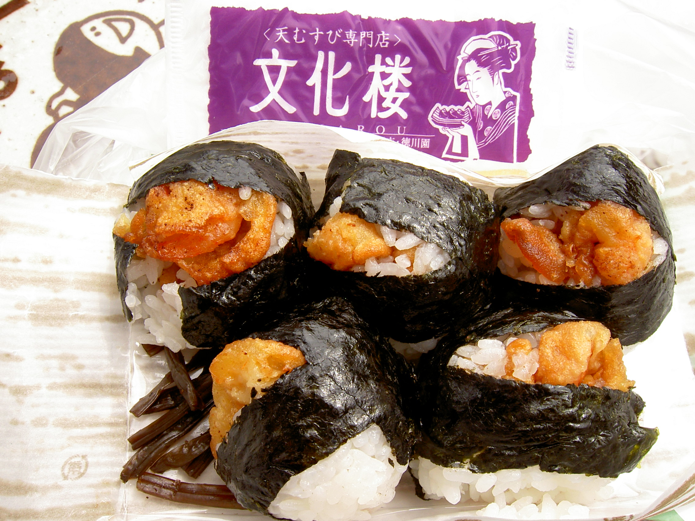 Aug 31, 2005 12:45 JST Ichinomiya, Aichi (愛知県一宮市)